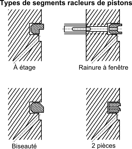 Types de segments racleurs de pistons